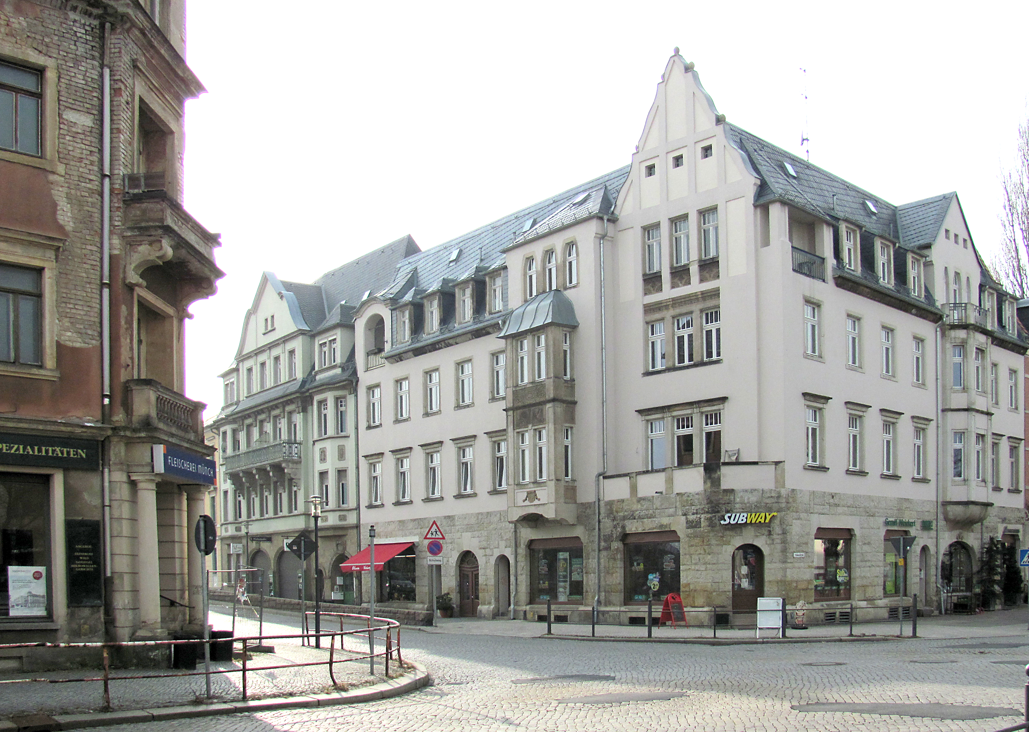 Radebeul, Wohn- und Geschäftshäuser Hauptstraße 6 und 8 rechts schließt sich Pestalozzistraße 2 an (orange), links Hauptstraße 4 (gelb, Radebeuler Sozialrathaus); auf der linken Kreuzungsseite Wohn- und Geschäftshaus Sidonienstraße 1 (Radebeul) (angeschnittem)